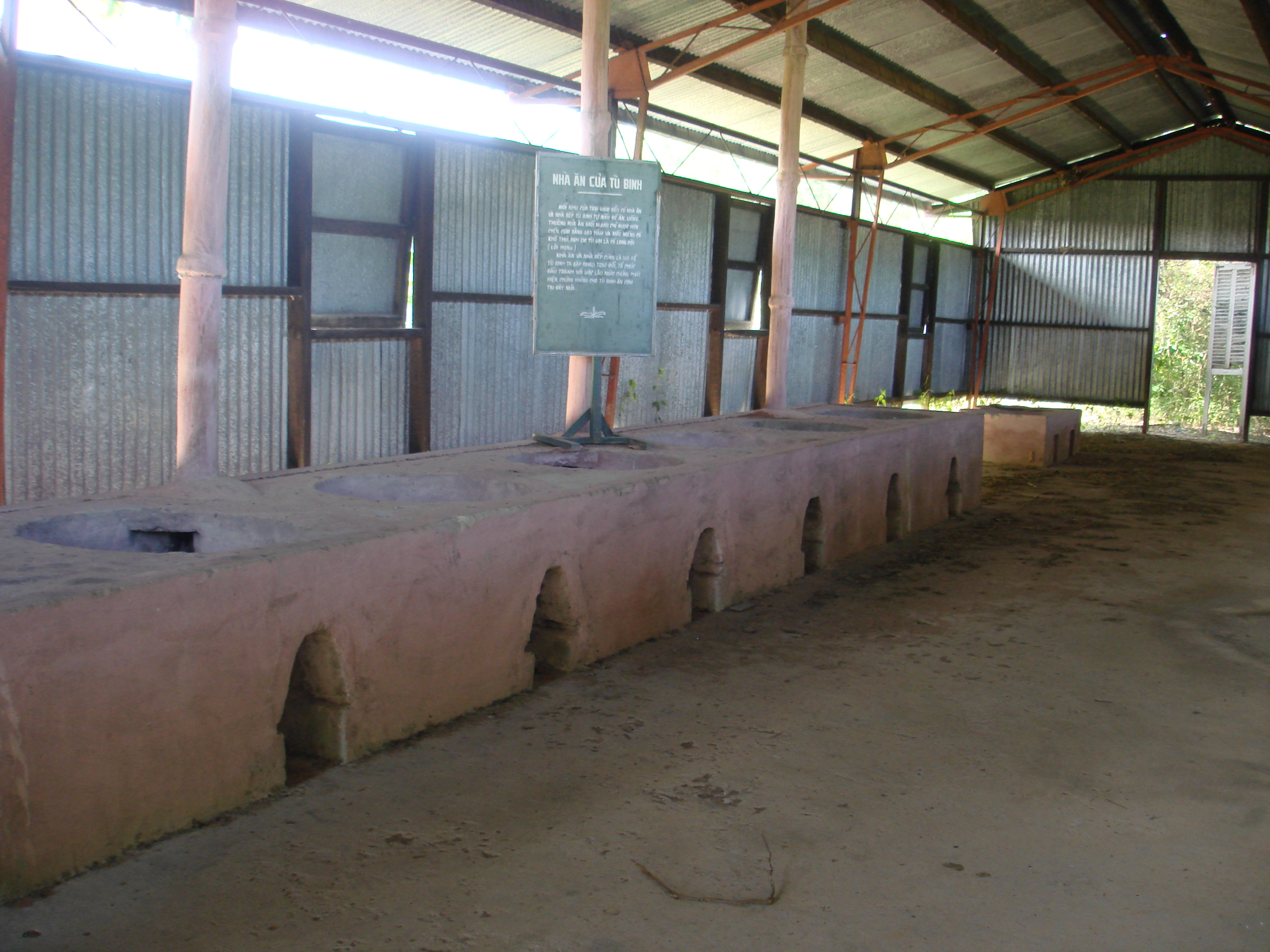 Phòng biêt giam nhà tù Phú Quốc.